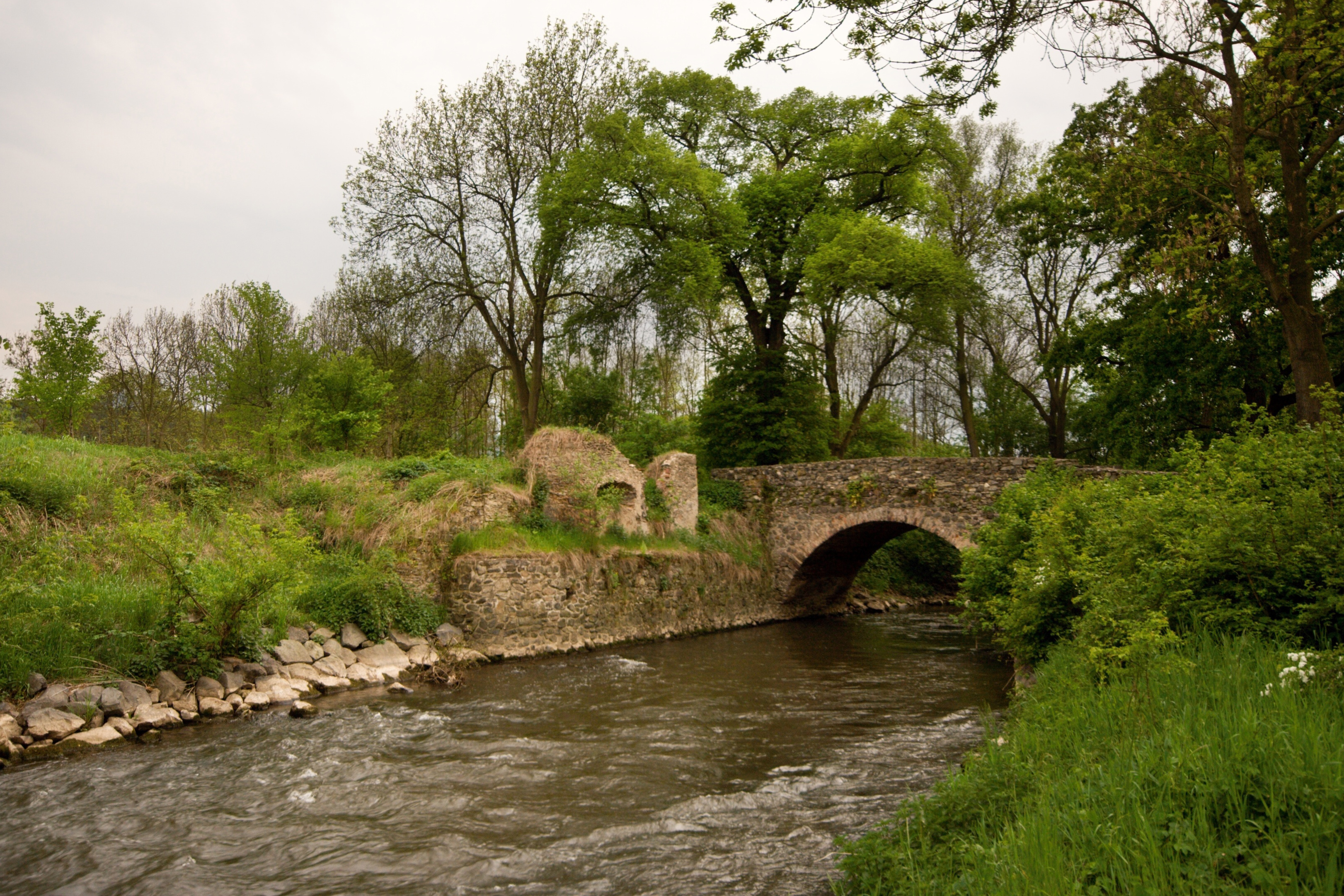 Mostek, u zaniklého vodního mlýna, Rtyně nad Bílinou.